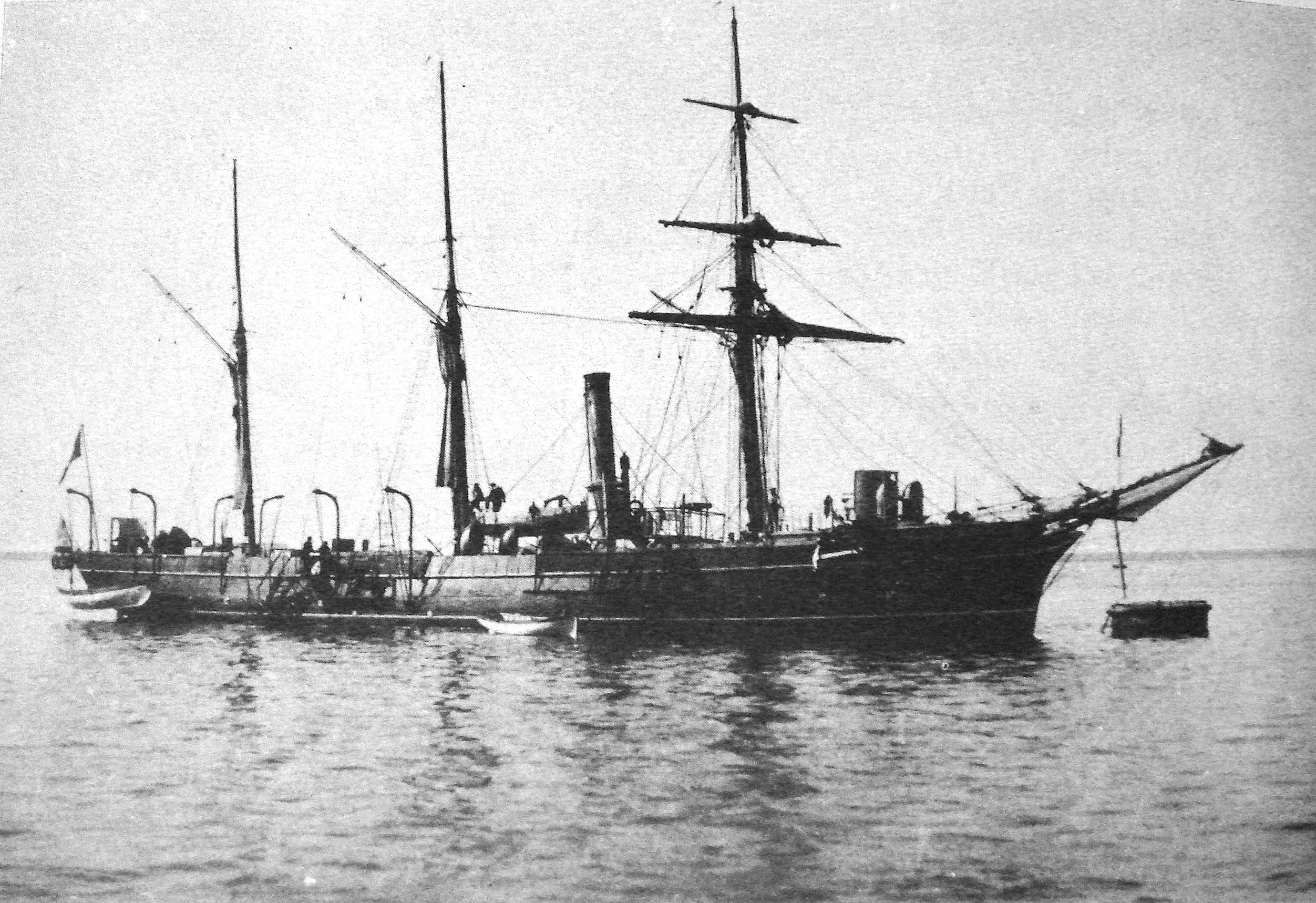 Canonniere_Comete_(1884-1909)_